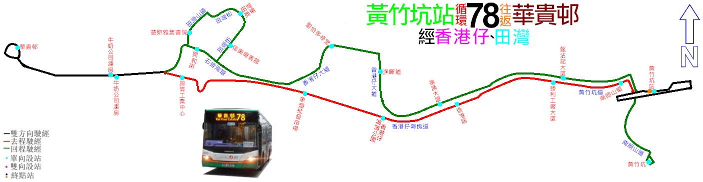 中文（香港）: 新巴78線的走線圖